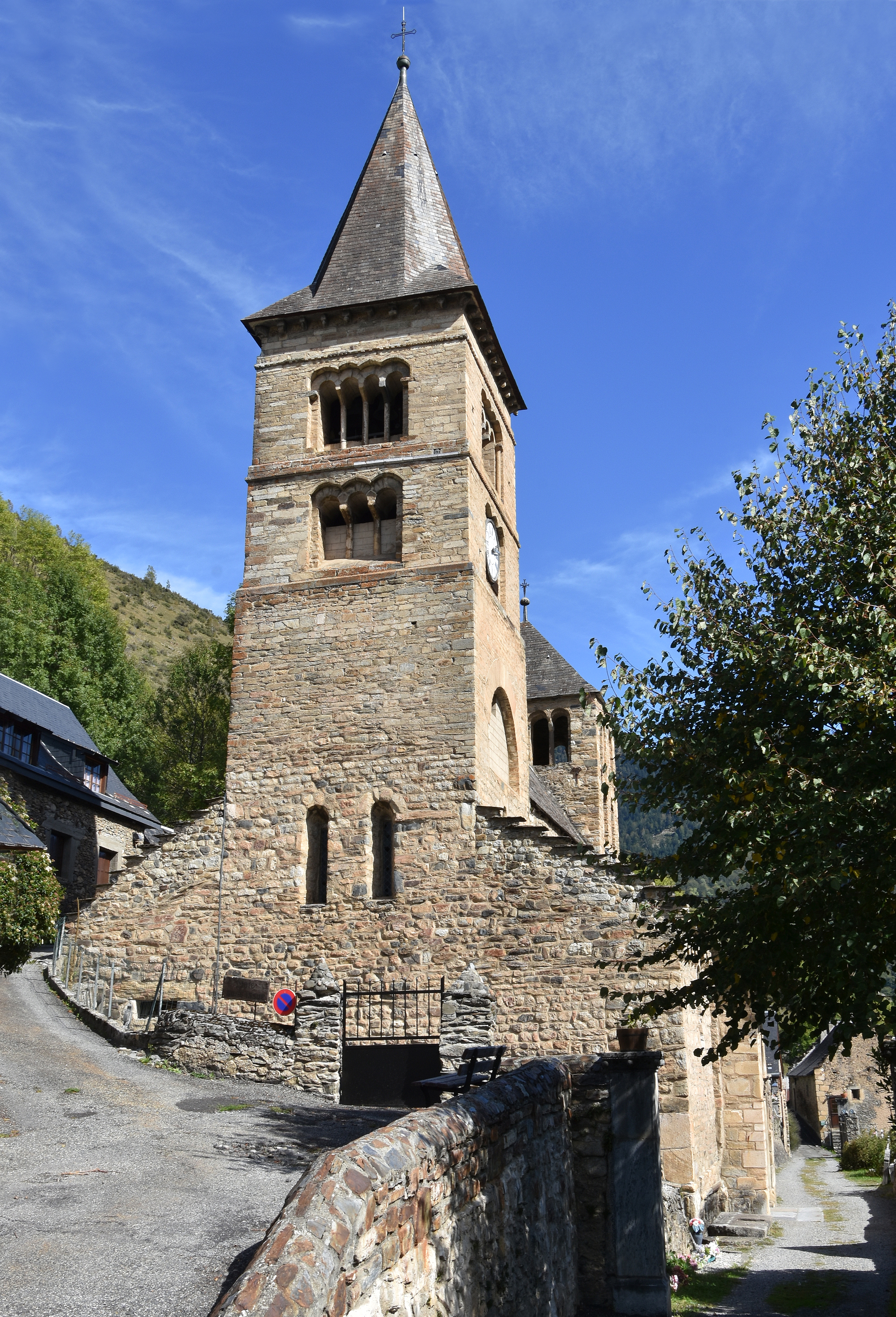 Église Saint-Aventin-de-Larboust de Saint-Aventin 7-10-2019 14-12-08